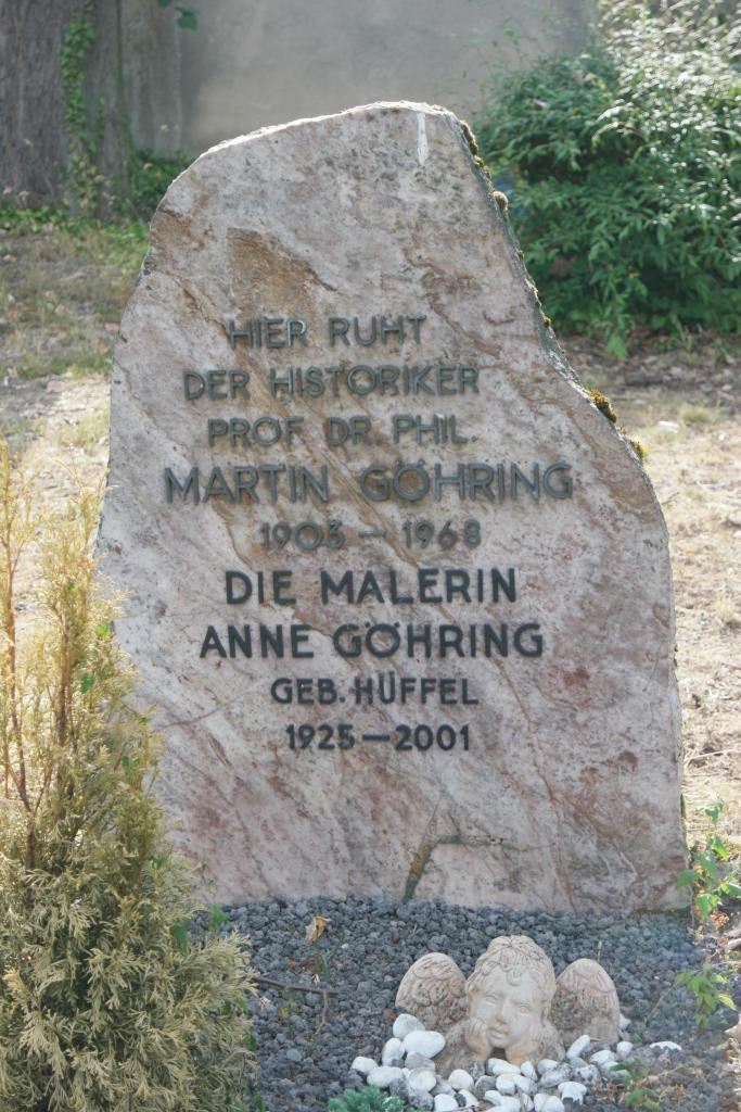 Grab der Malerin Anne Göhring (1925-2001) und des Historikers Martin Göhring (1903-1968) auf dem Hauptfriedhof Mainz